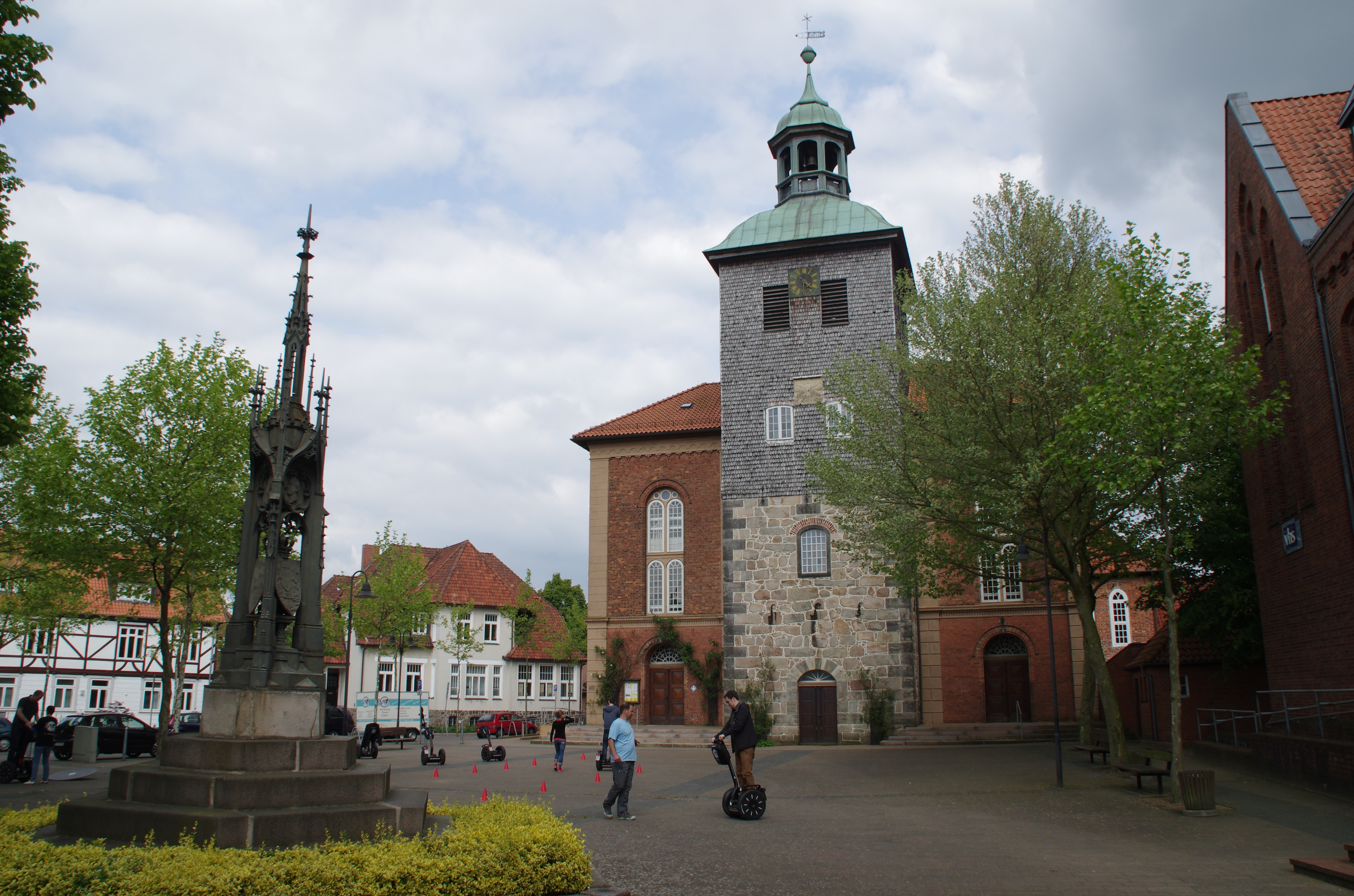 Walsrode in Niedersachsen. Die Kirche und das Welfendenkmal stehen unter Denkmalschutz.